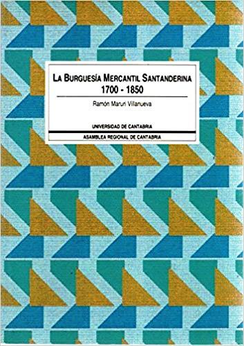 Maruri. La burguersía mercantil santanderina